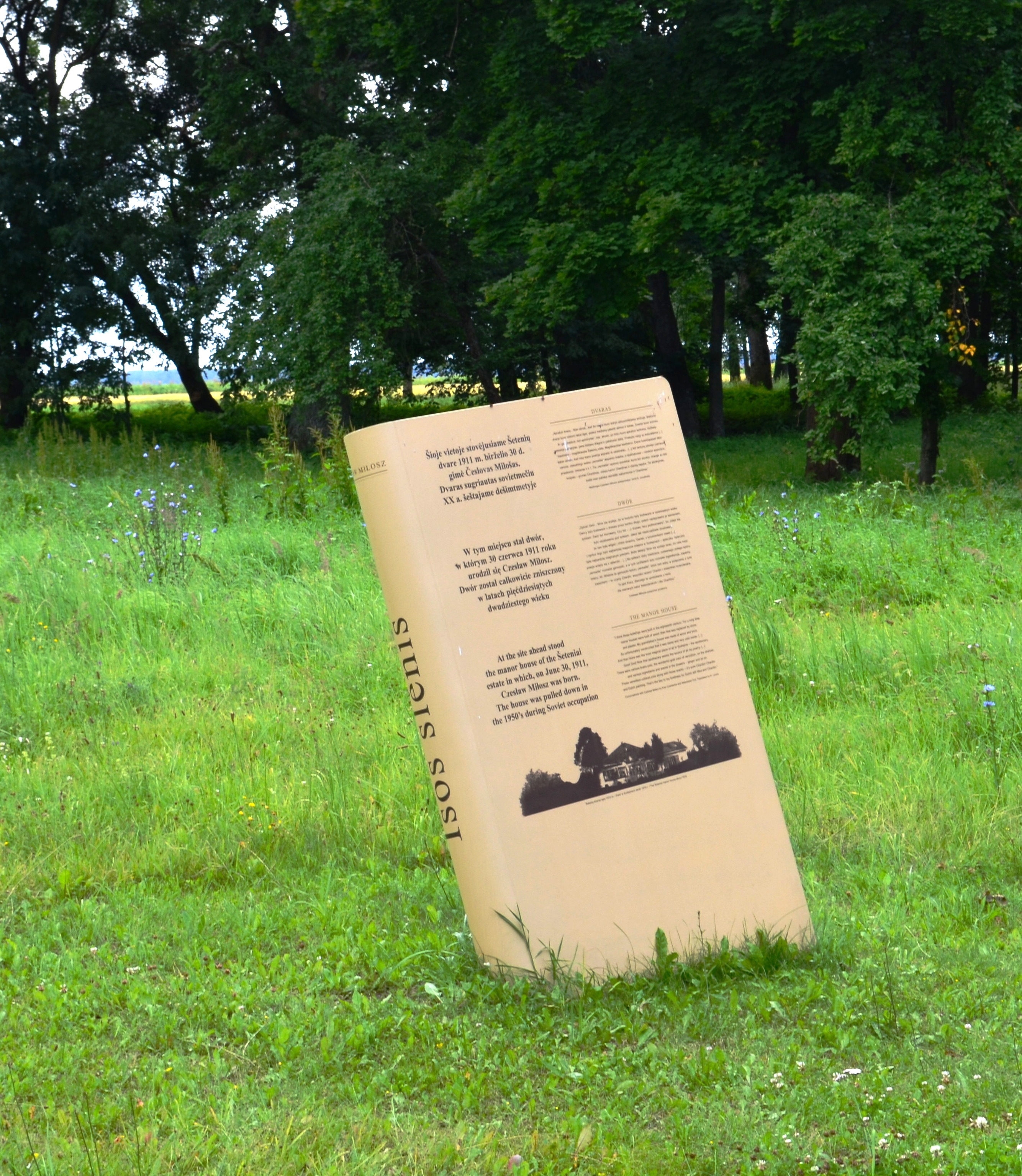 "Isos slėnis", Šeteniai, Kėdainių raj.